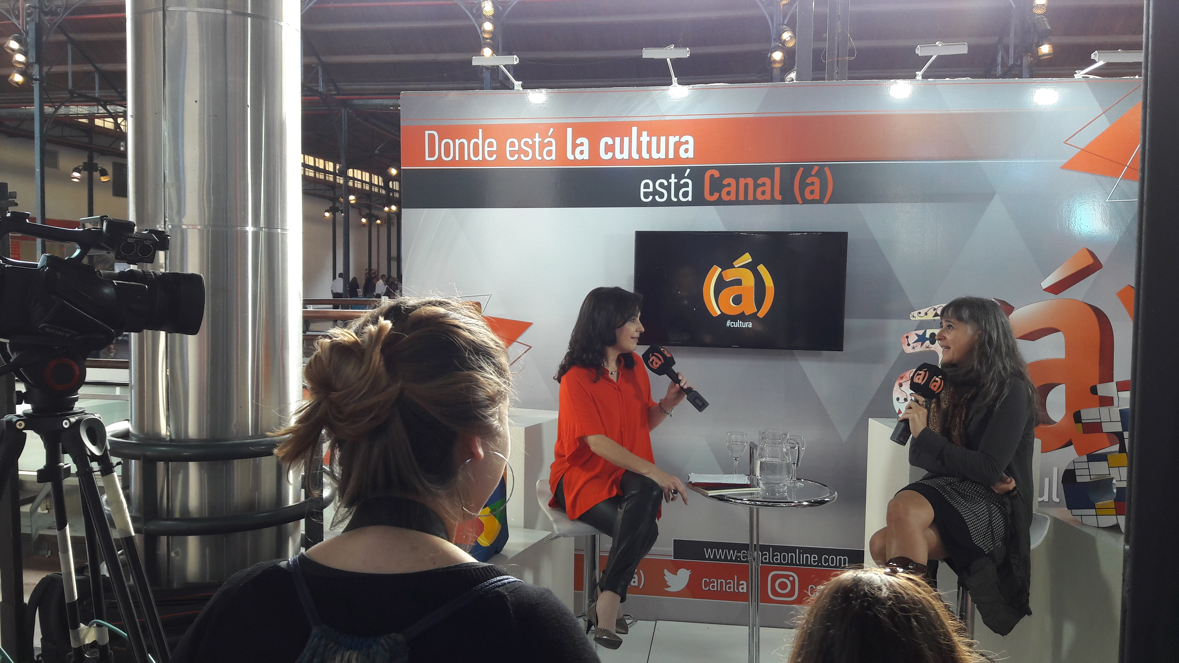 44ª Feria Internacional del Libro de Buenos Aires. Mayo de 2018, BA, Argentina.